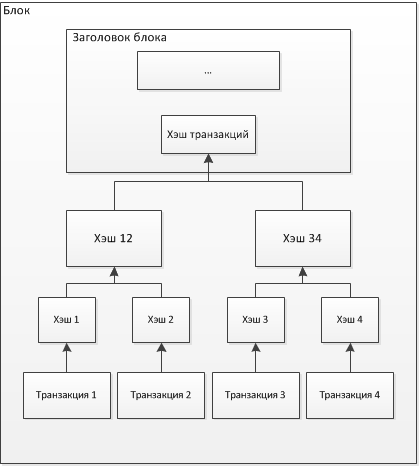 Хэш_транзакций